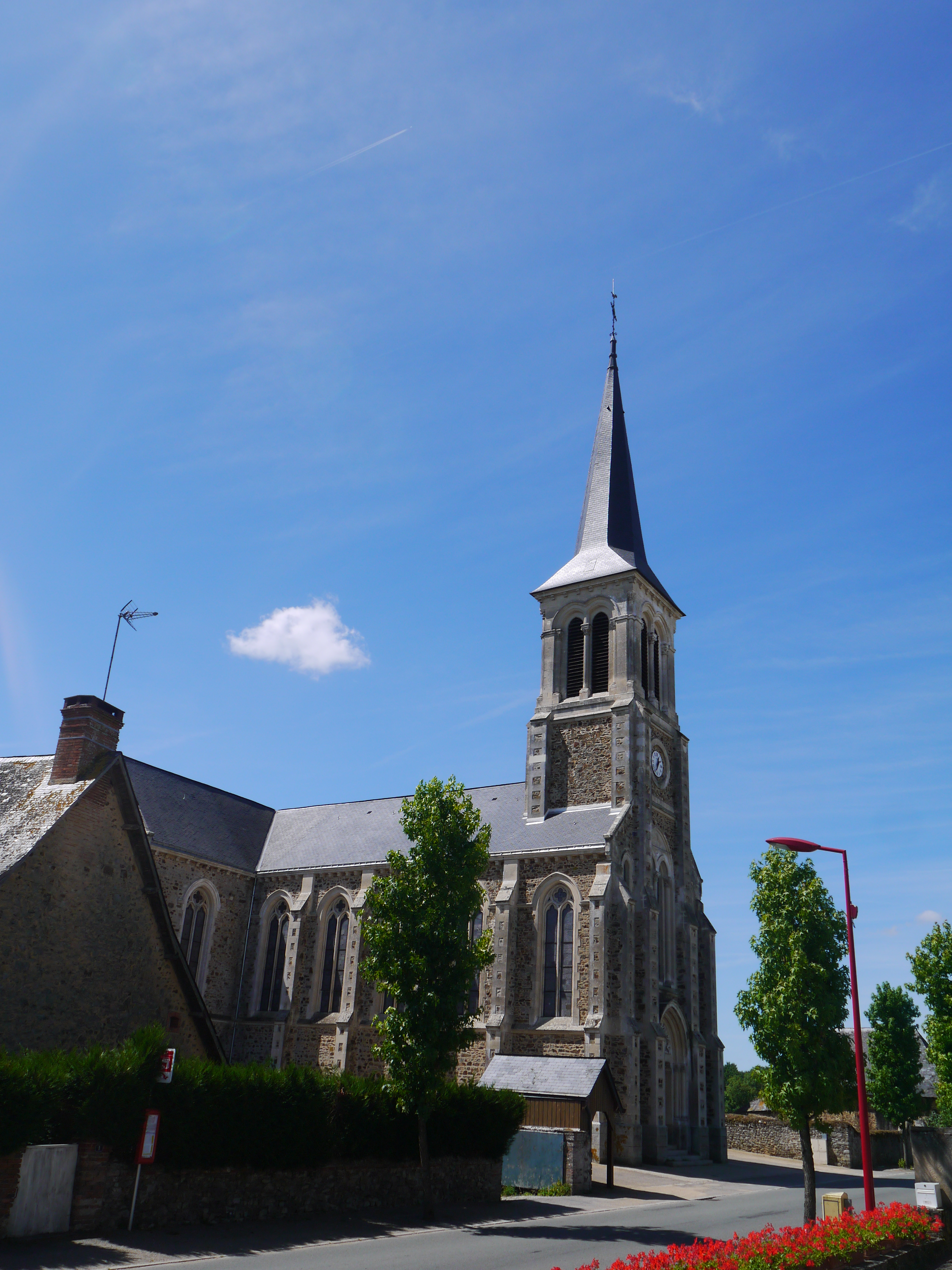 Niafles église